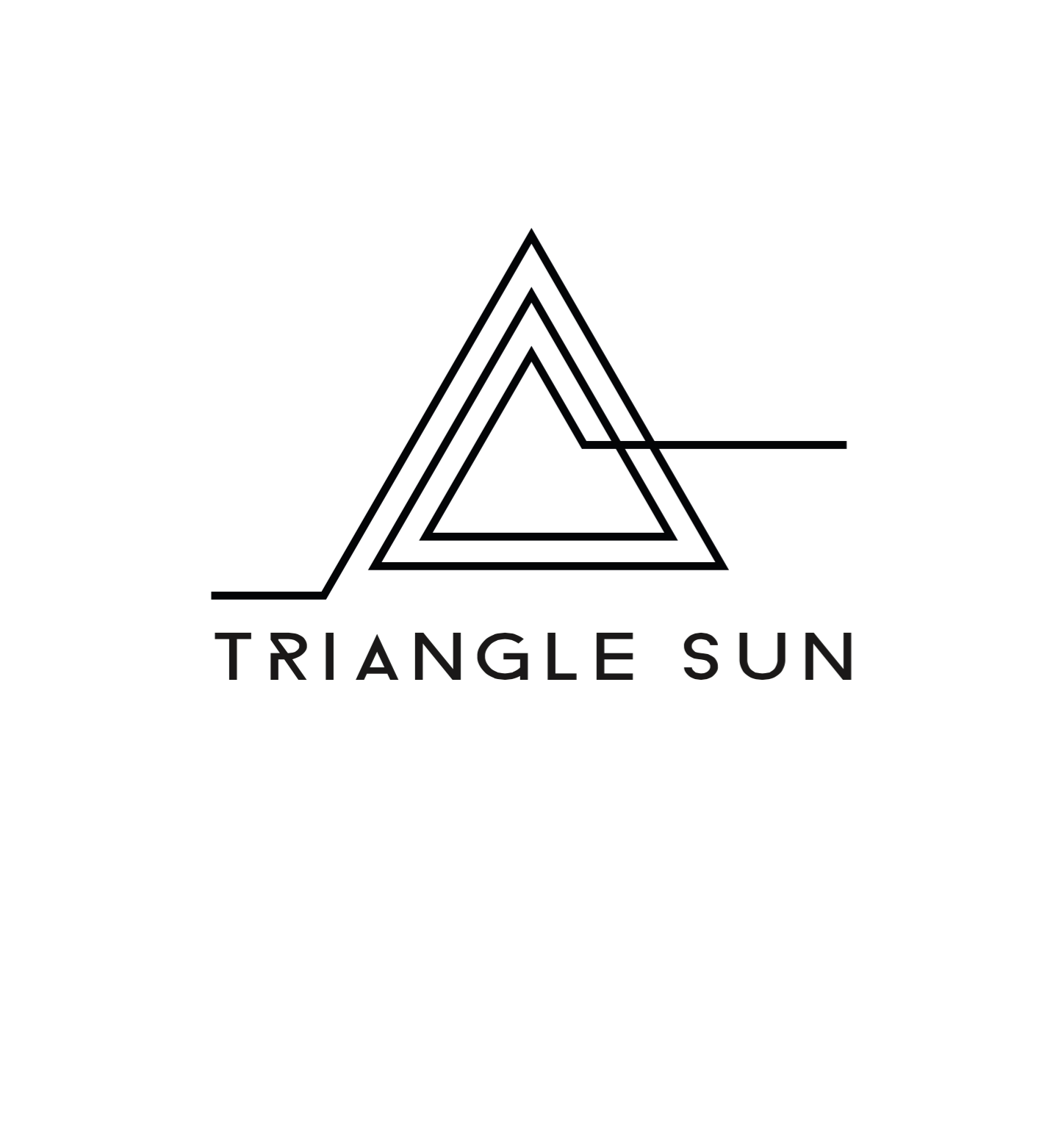 Логотип проекта Triangle Sun